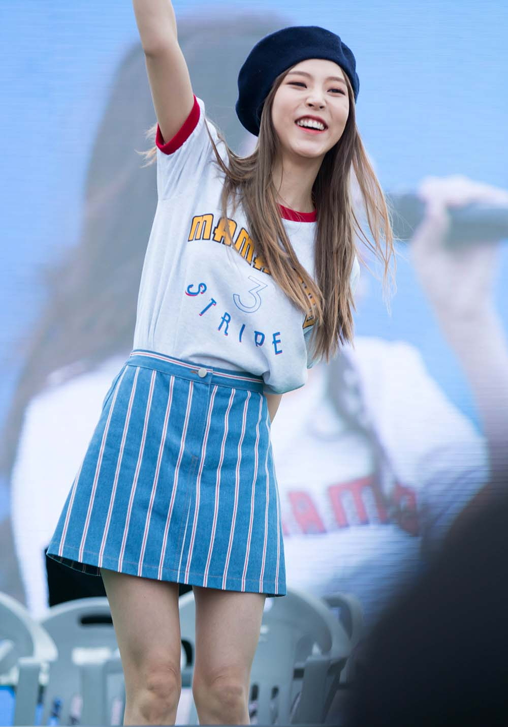 160505 영암 모터&레저 스포츠 한마당 - 문별 11pic.By.Holic